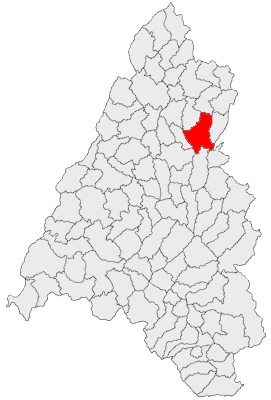 Categorie:Hărţi ale judeţului Bihor